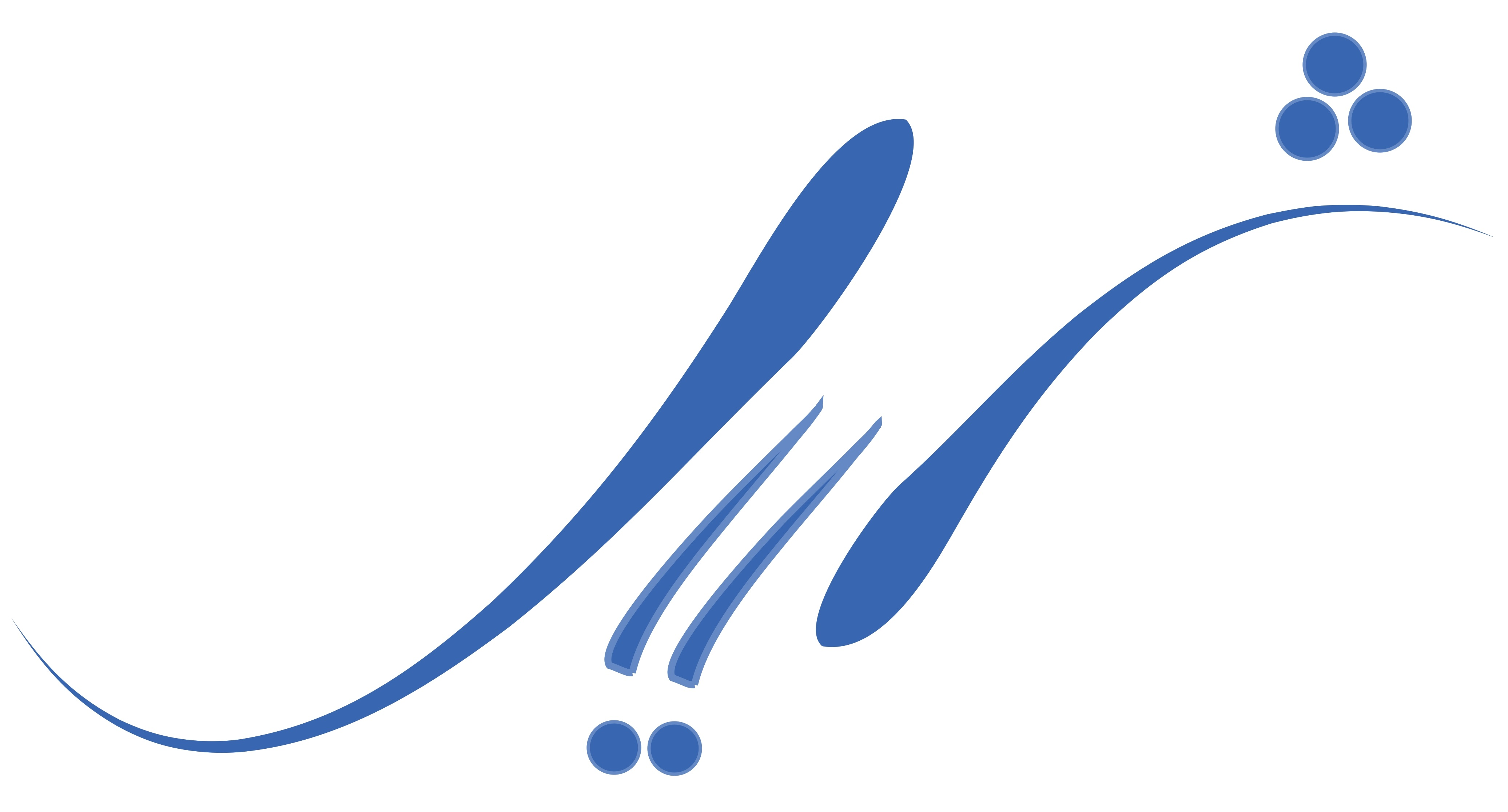 shil arm